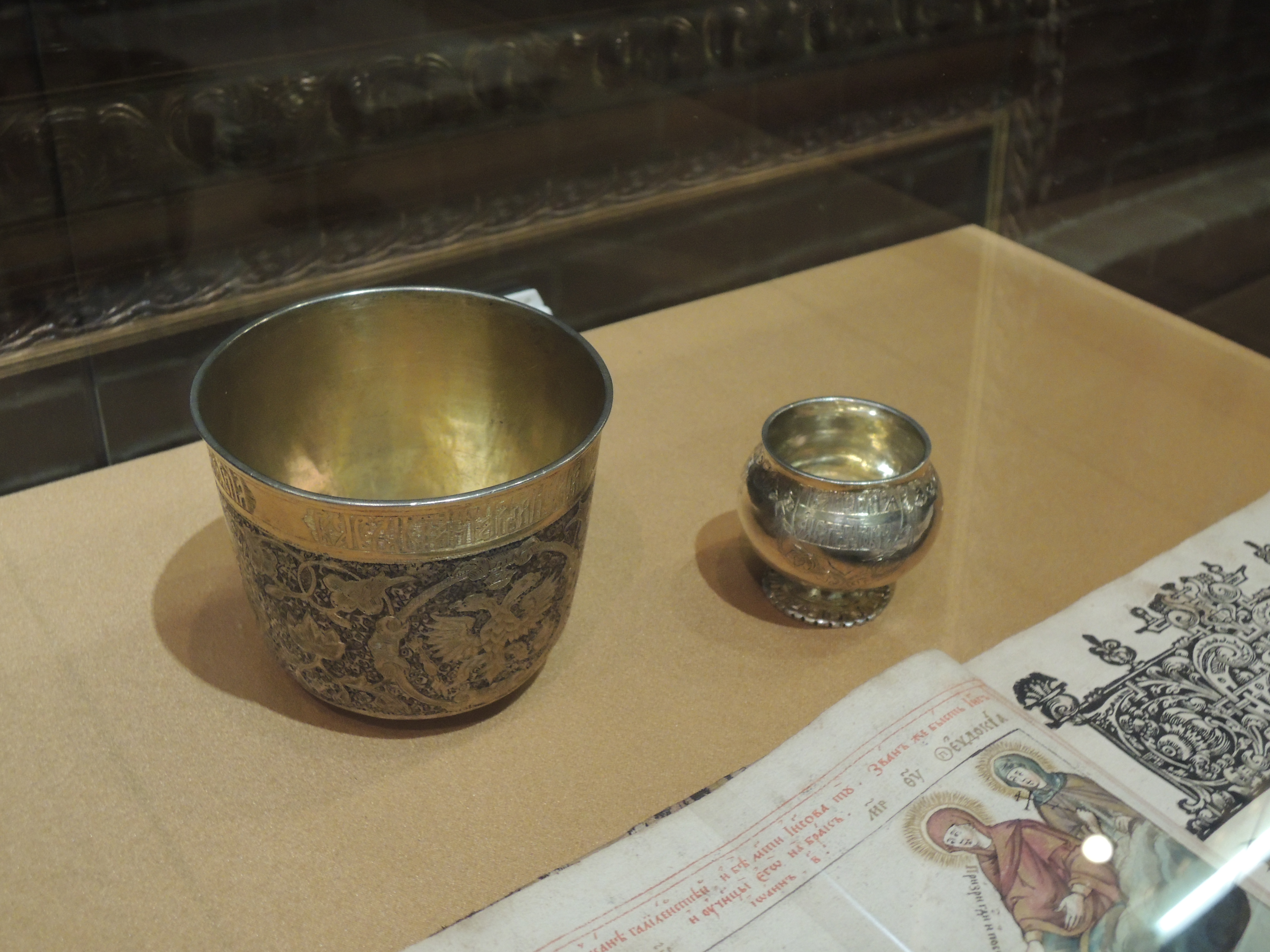 Стакан царевича Алексея Петровича (17 век). Братина детская царевича Алексея Петровича, (1690, ГИМ) Выставка "Романовы. Начало династии", приуроченная к 400-летию избрания на царство Михаила Федоровича Государственный Исторический музей, весна 2013 года